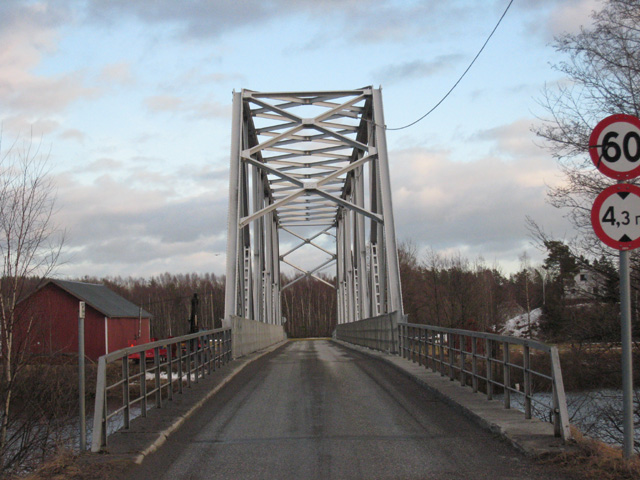 Fv161 fra Furre bru til 42 Ovelandsdalen i Froland. (Faktisk Furre bru på Fv172.)